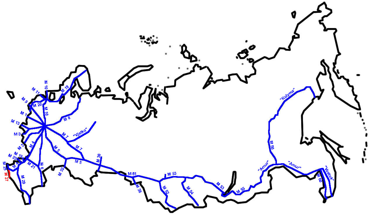 M27 im russischen Fernstraßennetz